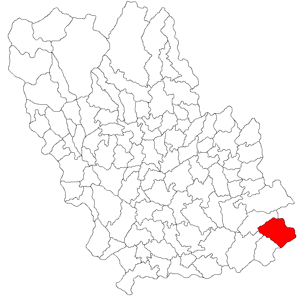 Categorie:Hărţi ale judeţului Prahova